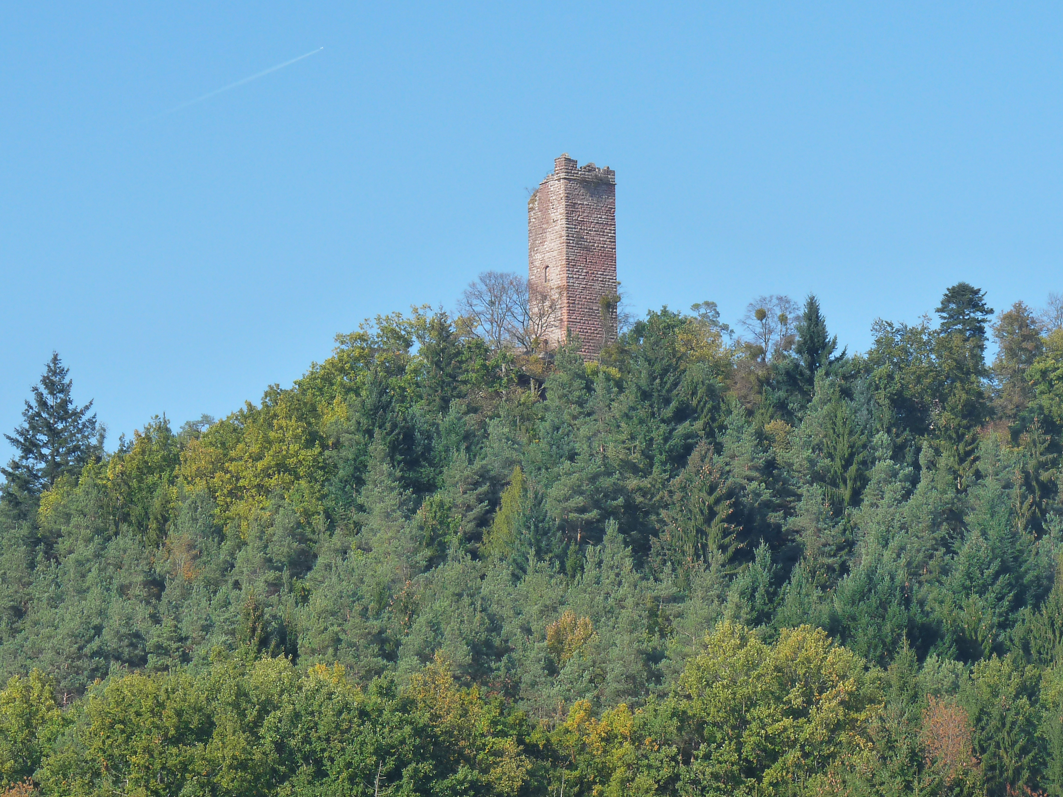 Château de Waldeck (Moselle)